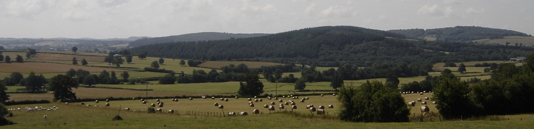 Paysage du sud-Morvan nivernais.